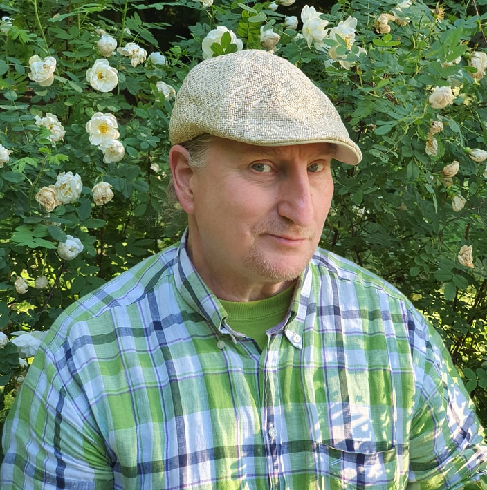 Henkilökuva